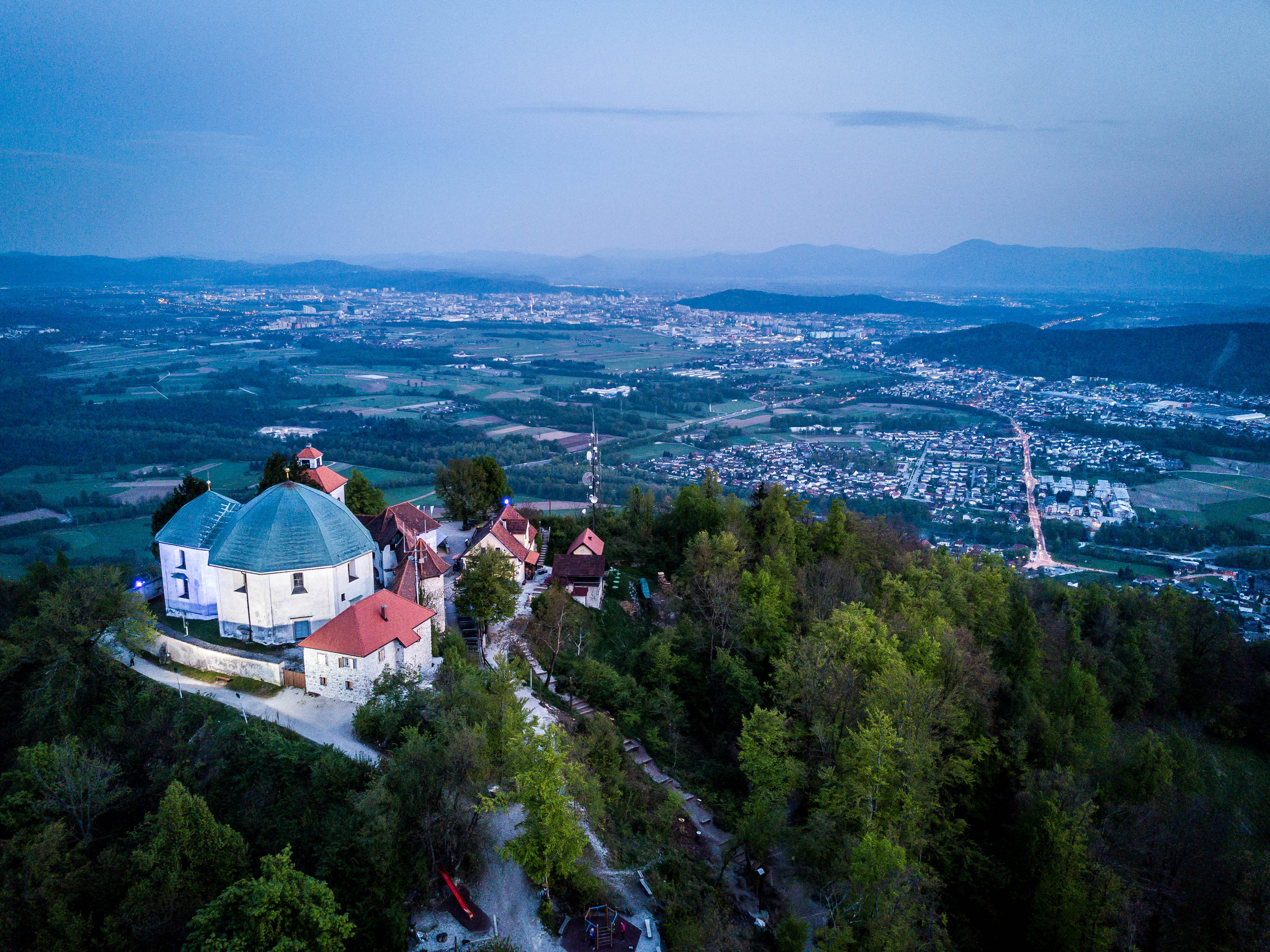 Šmarna gora